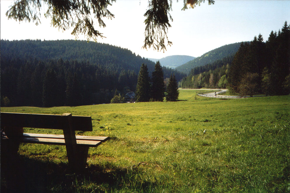 Motiv aus dem Erzgebirge bei Oberwildenthal